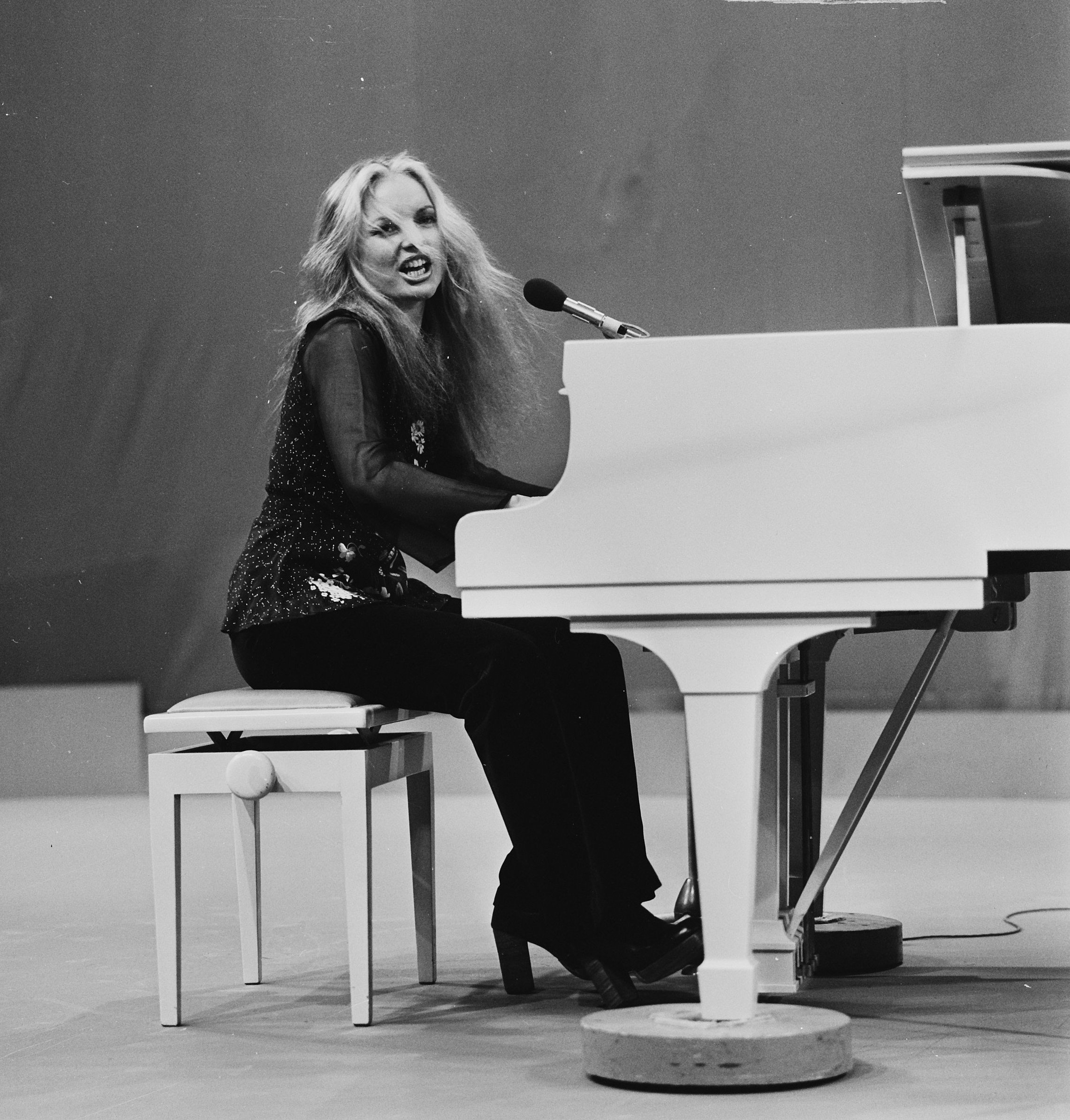 De Amerikaanse zangeres Chi Coltrane tijdens opnamen voor het AVRO televisieprogramma Toppop Datum 11 januari 1974